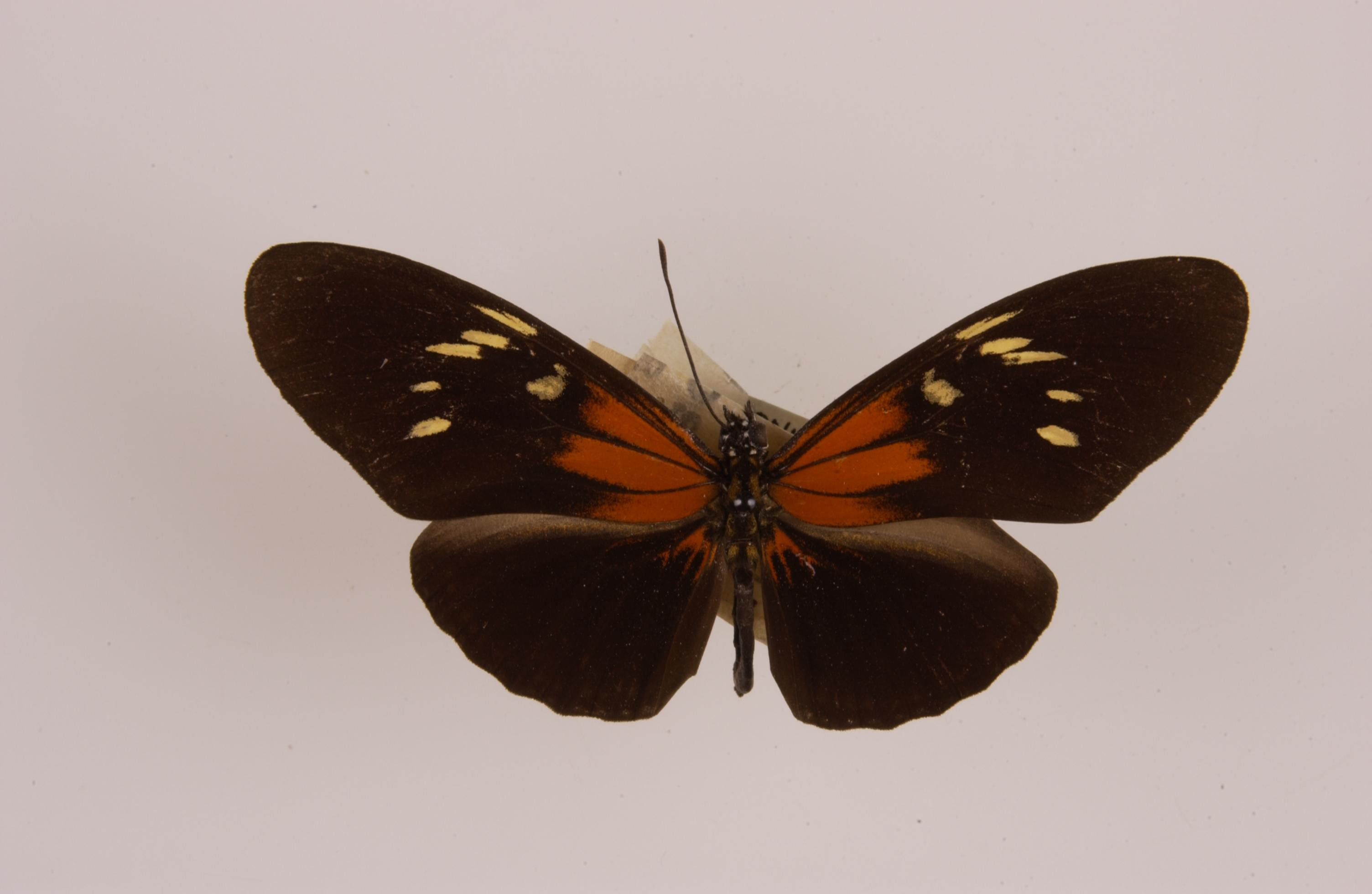 Eueides tales surdus